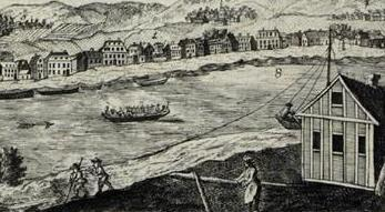 Ansicht des Dorfes Laubegast bei Dresden, Blick über die Elbe nach Süden, im Hintergrund die Dörfer Klein- und Großzschachwitz, Lockwitz, Prohlis, Leuben und Dobritz; Treideln im englischen unter Burlaks